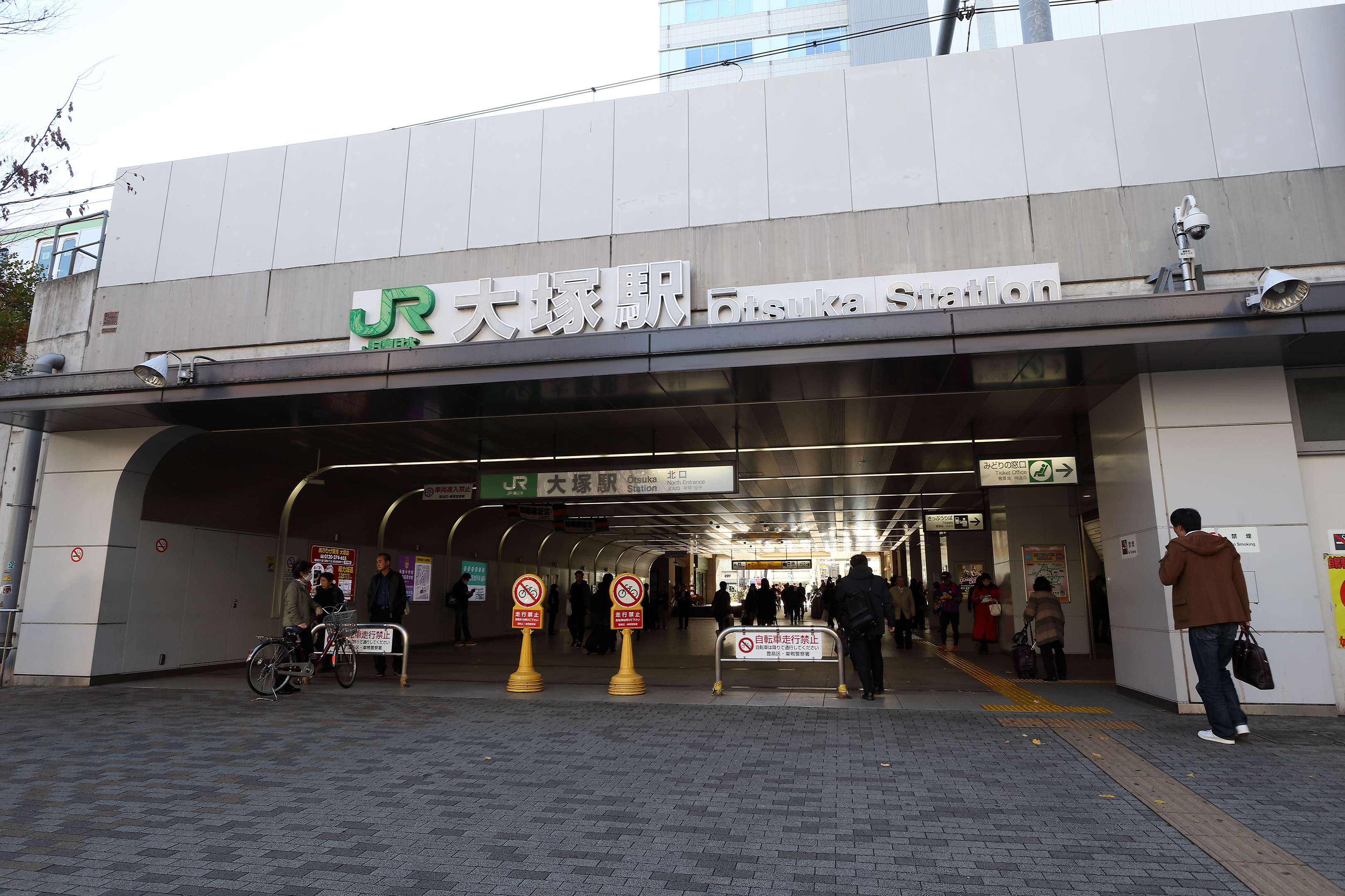 大塚駅北口